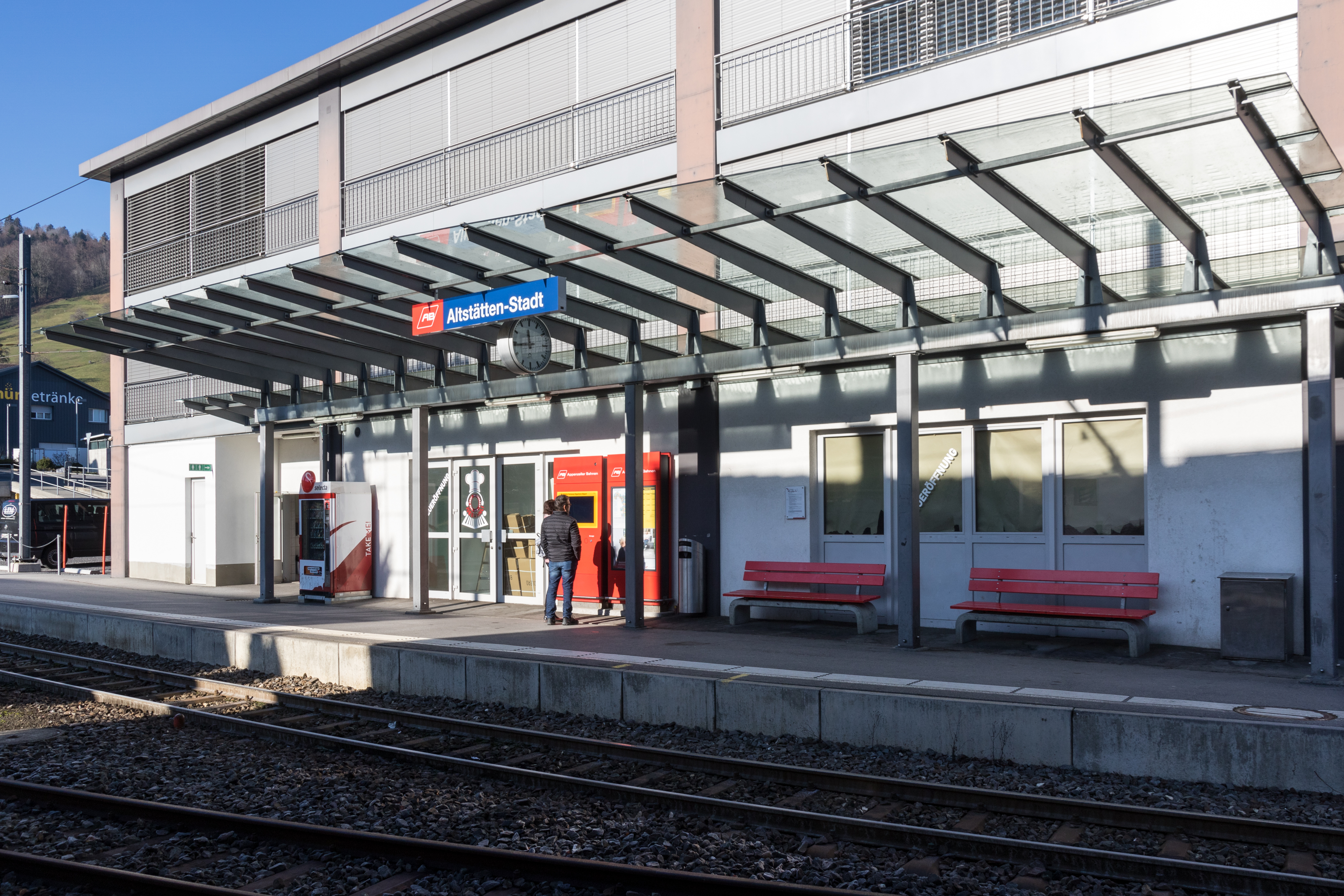 Bahnhof Altstätten-Stadt der Appenzeller Bahnen. Start- und Endstation der Bahnstrecke Altstätten - Gais.